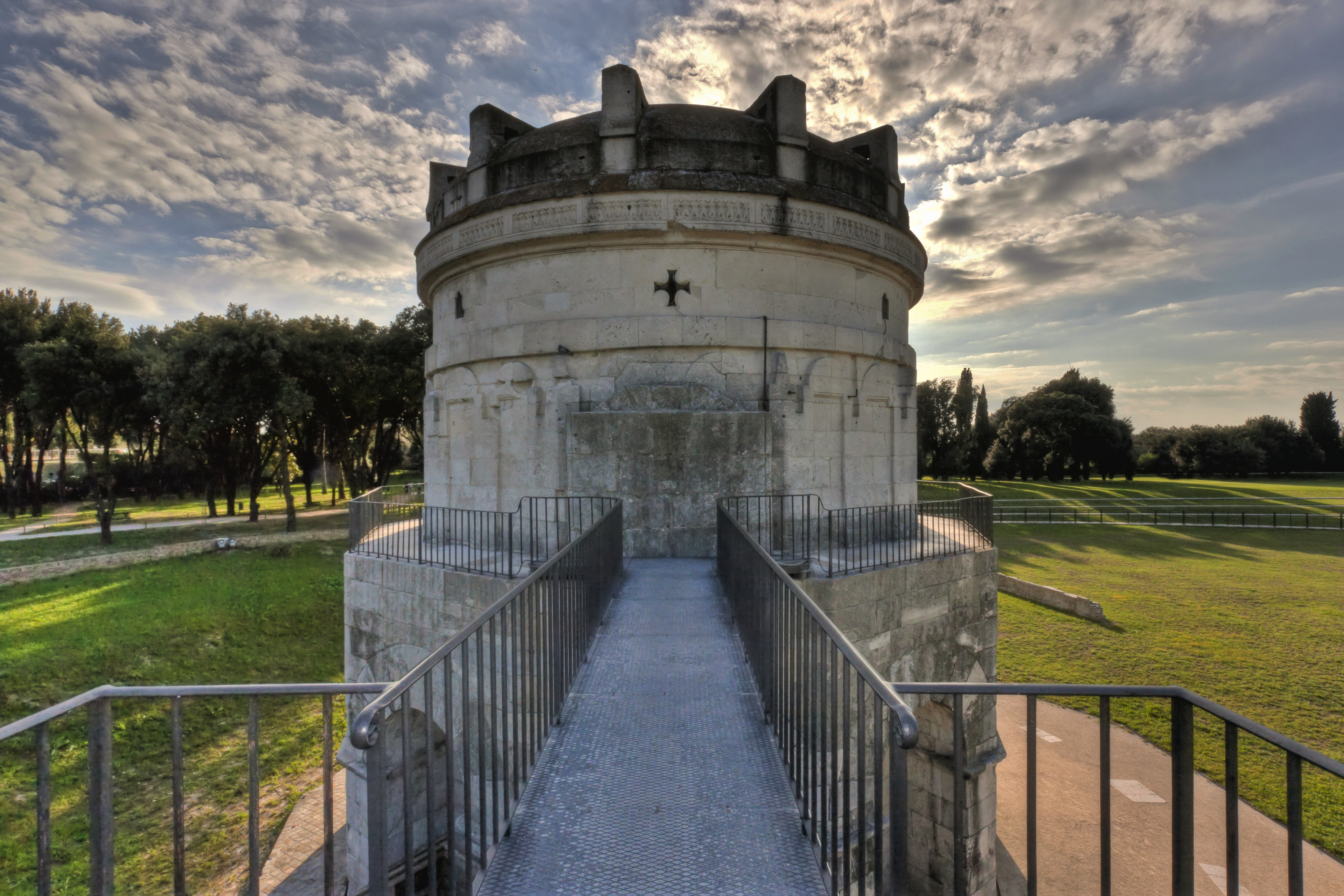 Vista esterna del Mausoleo di Teodorico a Ravenna This is a photo of a monument which is part of cultural heritage of Italy.